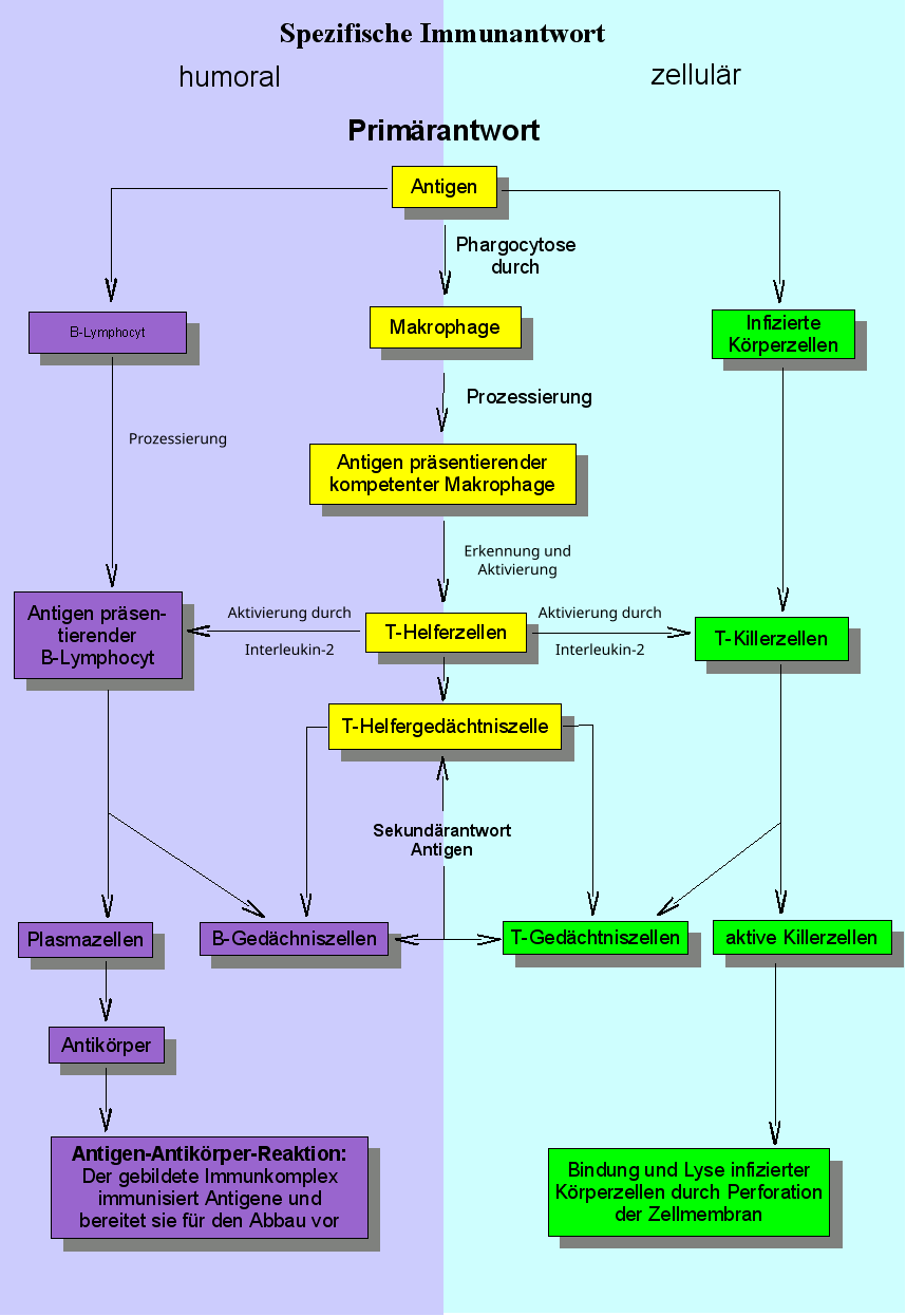 Spezifische Imunantwort